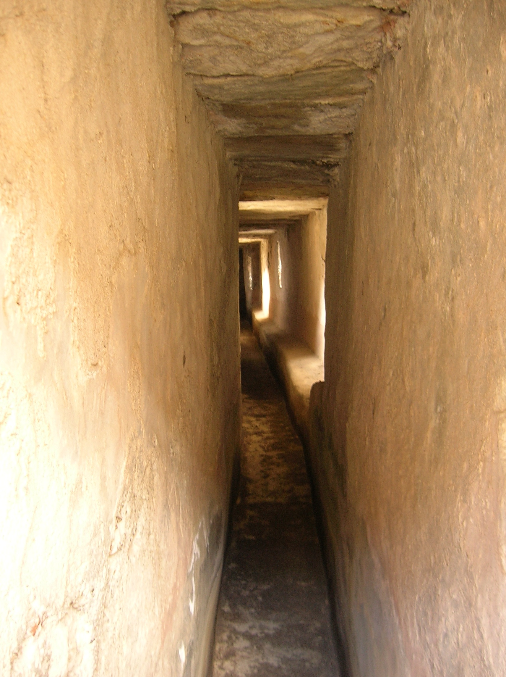 Interno del Ponte acquedotto di Grand Arvou, in località Porossan, Aosta, Valle d'Aosta, Italia.